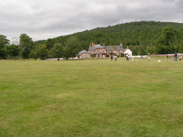 Potarch Green and hotel, Aberdeenshire